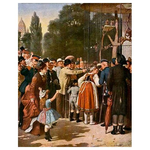 Jean Lulves "Vor dem Affenhaus im Berliner Zoo" 83 x 105